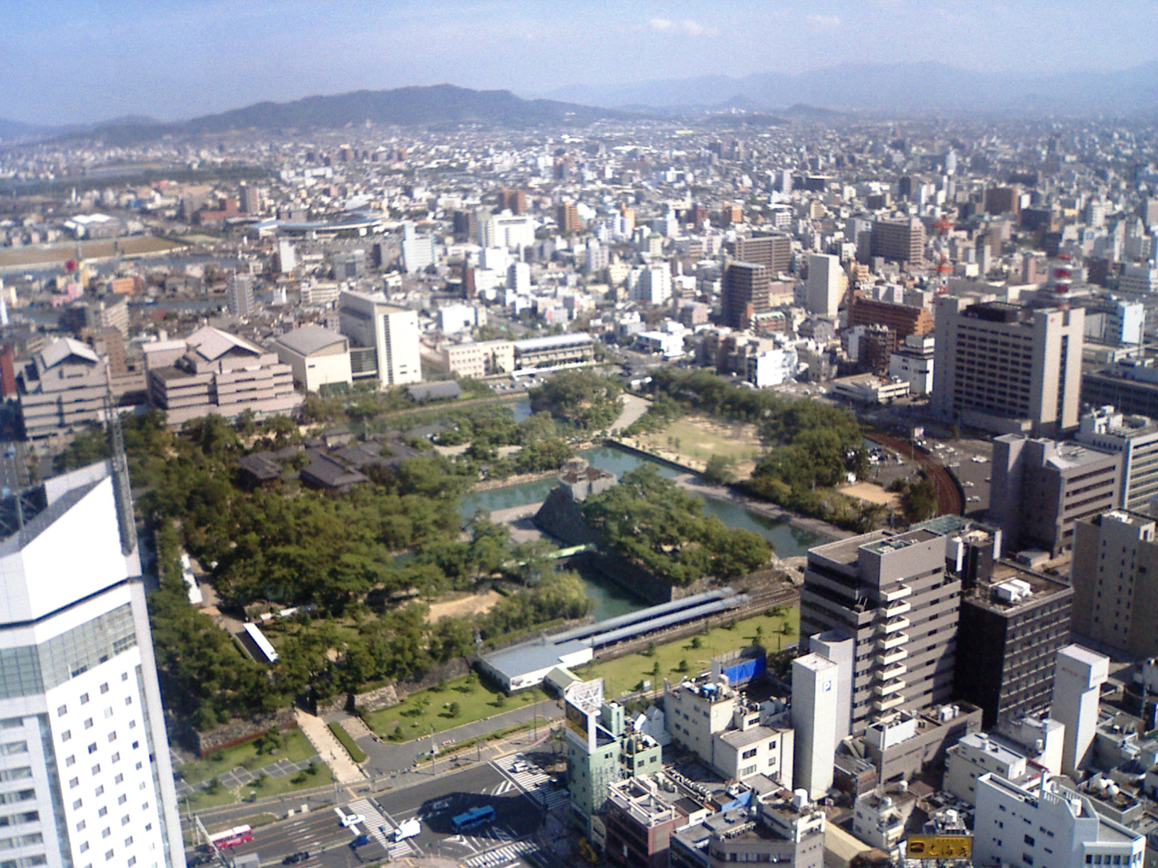 高松城 (讃岐国)周辺の市街地。高松シンボルタワーから全景と周辺部を撮影。 - 日本国香川県高松市。